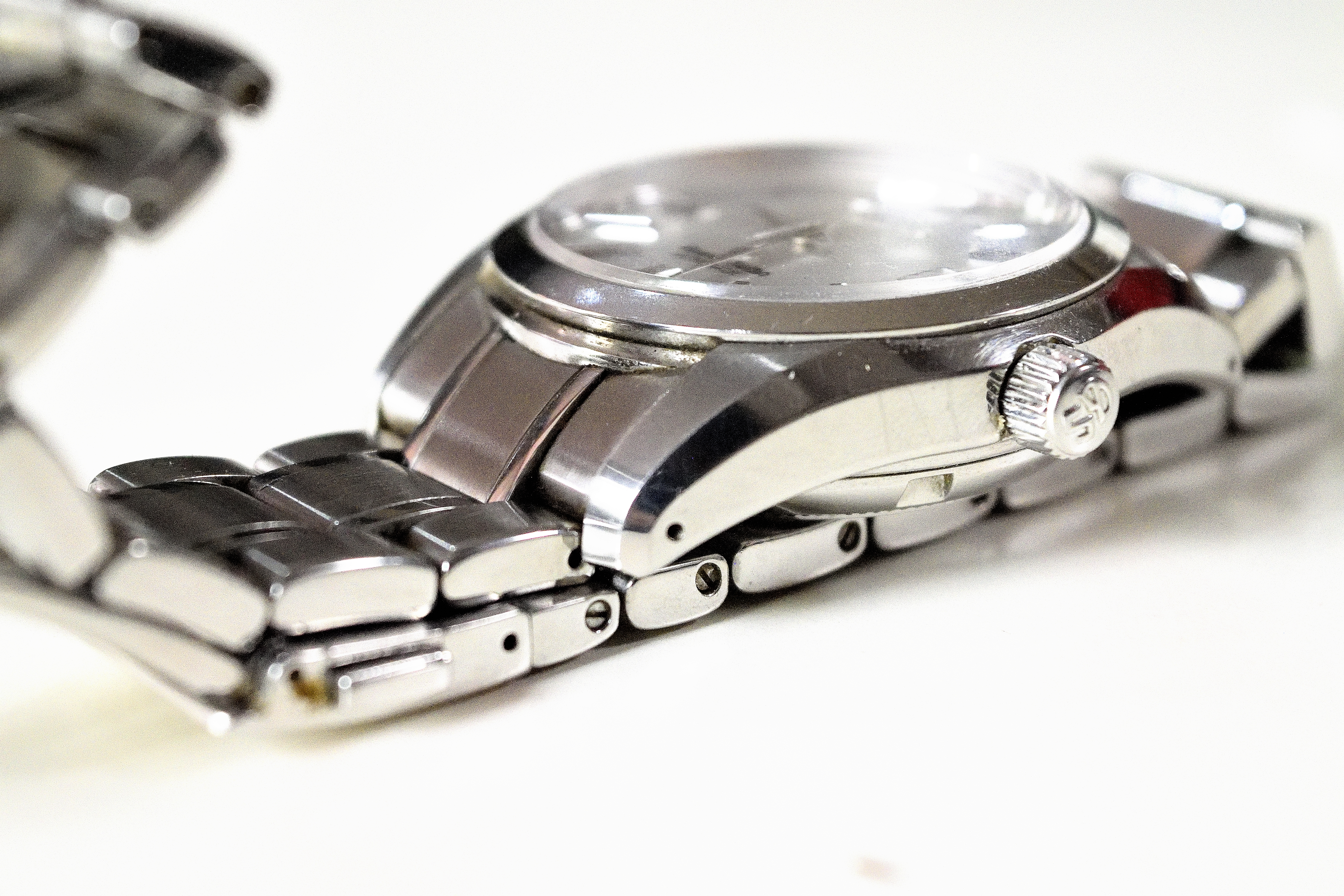 ＳＢＧＲ０５１ 側面図